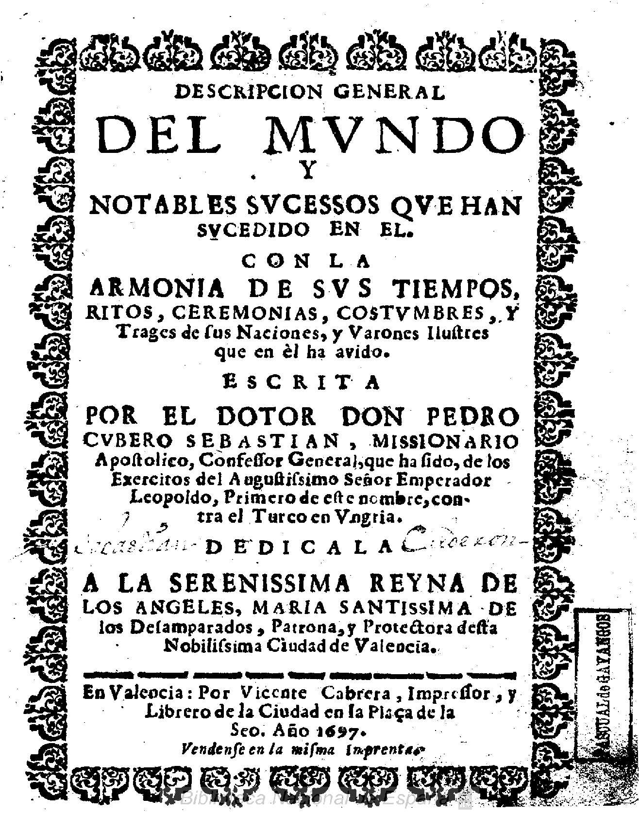 Descripcion general del mundo y notables sucessos que han sucedido en el : con la armonia de sus tiempos, ritos, ceremonias, costumbres, y trages de sus naciones, y varones ilustres que en él ha avido escrita por el dotor don Pedro Cubero Sebastian ... Autor: Cubero Sebastián, Pedro Fecha: 1697 Datos de edición: En Valencia, por Vicente Cabrera, impressor, y librero ... Vendense en la misma Imprenta